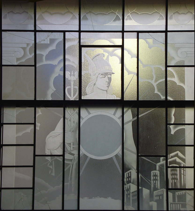 Vitral de Mercúrio no Clube do Comércio de Porto Alegre, Brasil. Inaugurado em 1939-40.